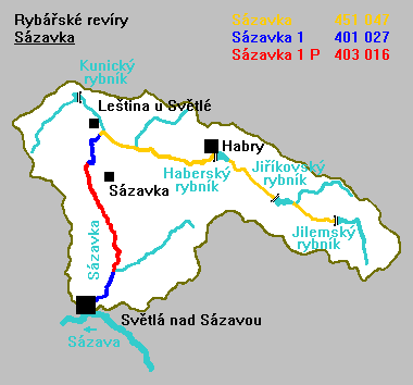 Rybářské revíry na říčce Sázavce